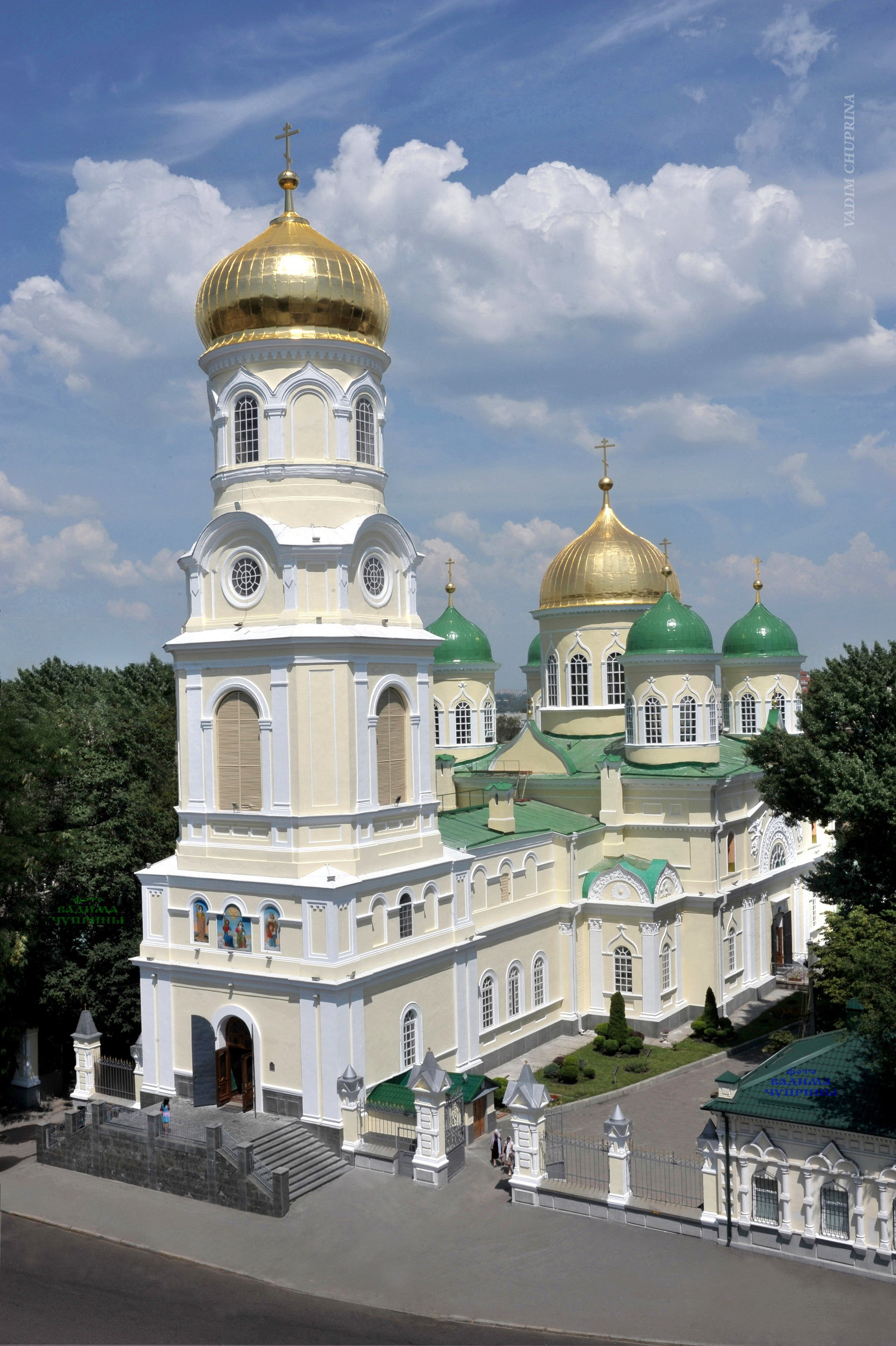 Свято-Троицкий собор (Днепр) , фото Чуприна Вадим.